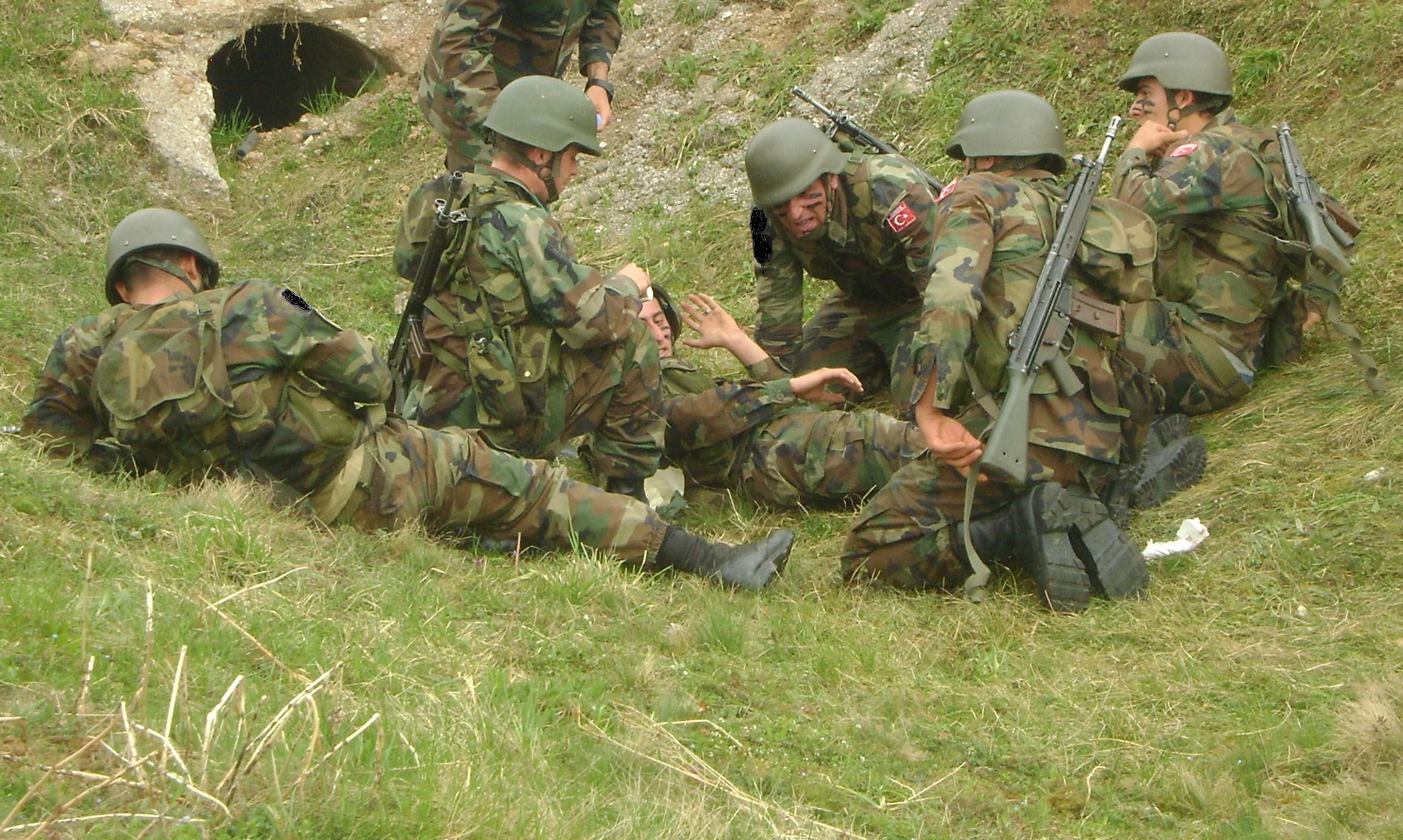 Turkish soldiers at medical training